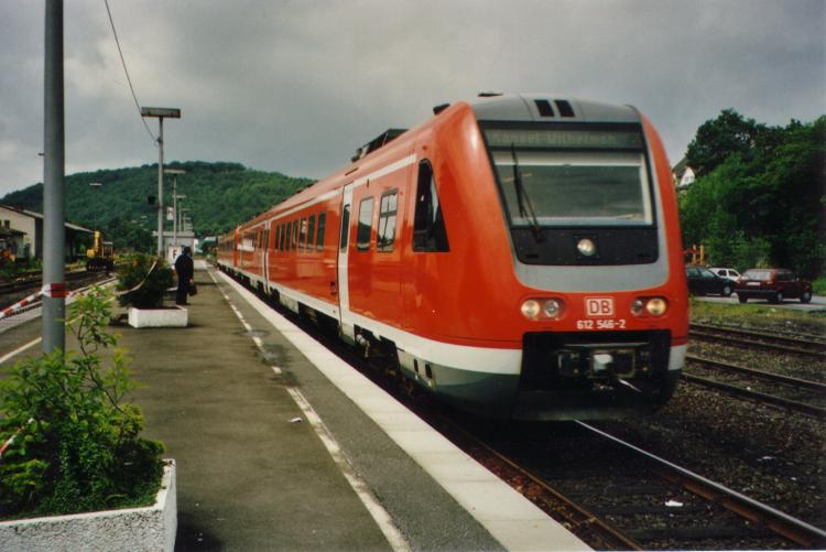 Triebwagen der Baureihe 612 während Bauarbeiten in Meschede